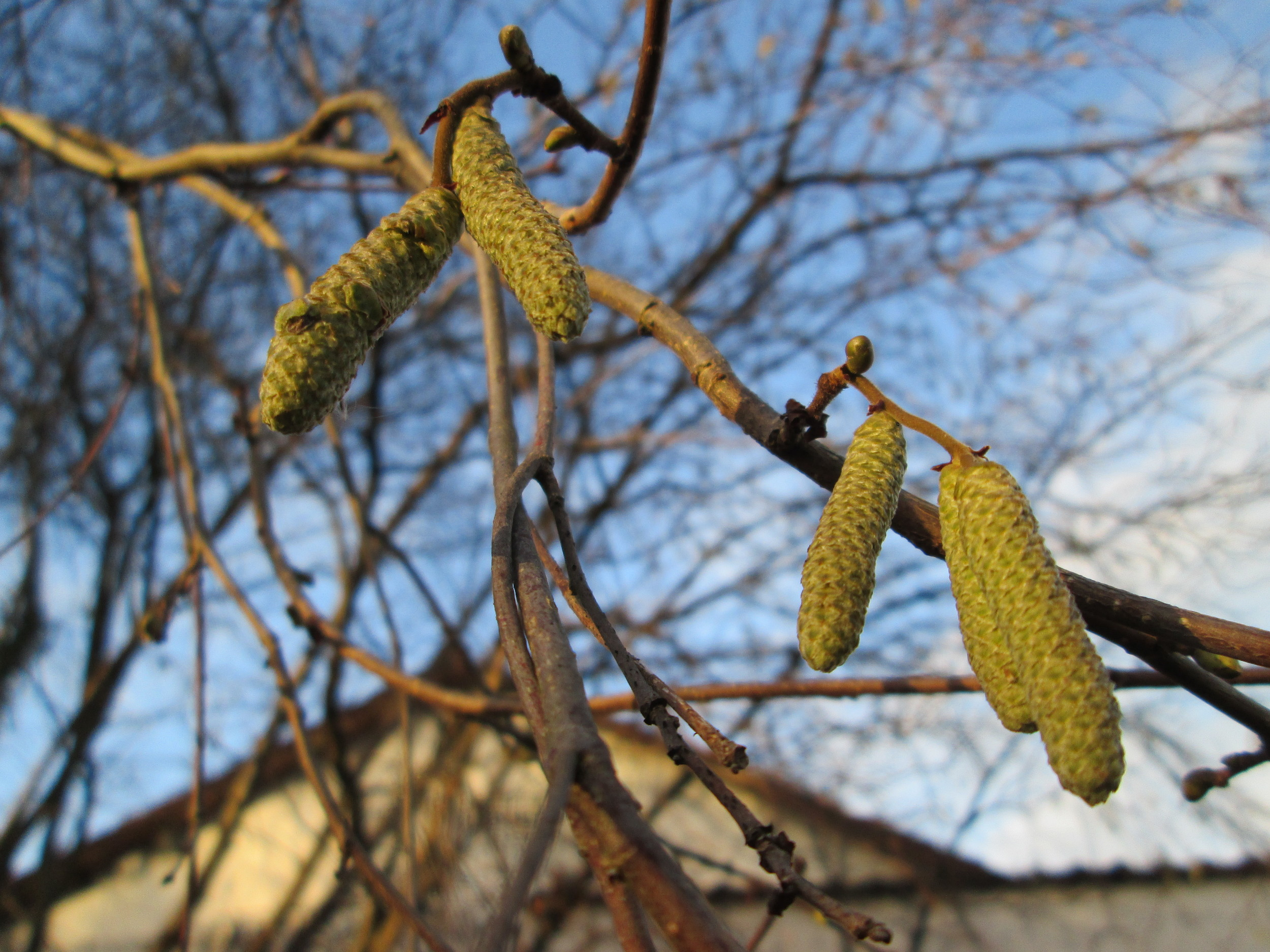 Haselnuss (Corylus avellana) in Hockenheim